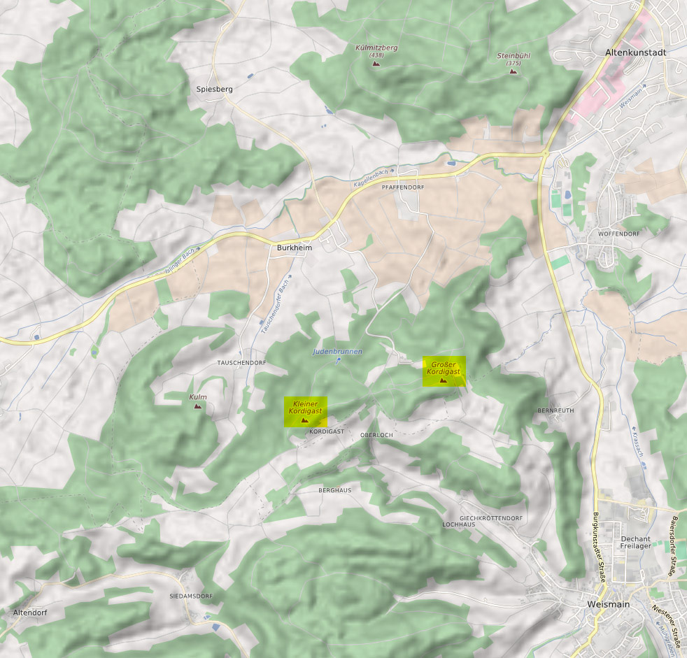 Umgebungskarte des Kordigast